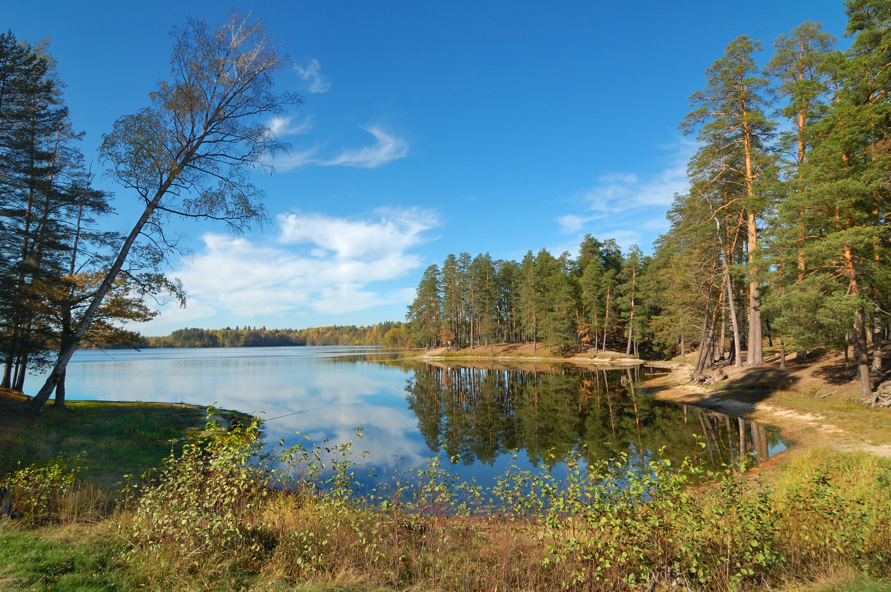 Пустынские озера: Арзамасский район, Нижегородская область This image is related to the protected area of Russia number 5210032